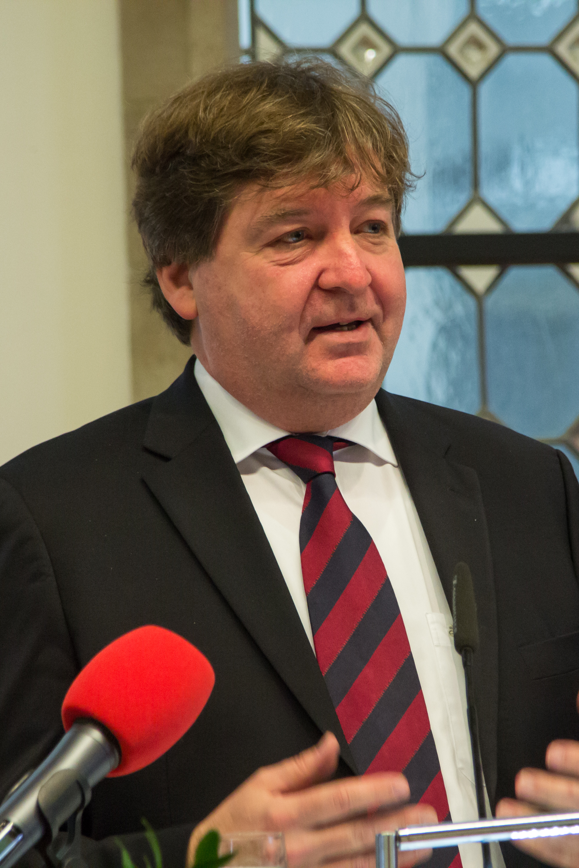 Empfang im Kölner Rathaus zur Amtseinführung des neuen Kardinals Rainer Maria Woelki am 28. September 2014 Foto: Moritz Woelk, Leiter des Museum Schnütgen, Köln